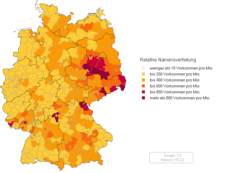 Relative Häufigkeit des Familiennamens Heinrich in Deutschland